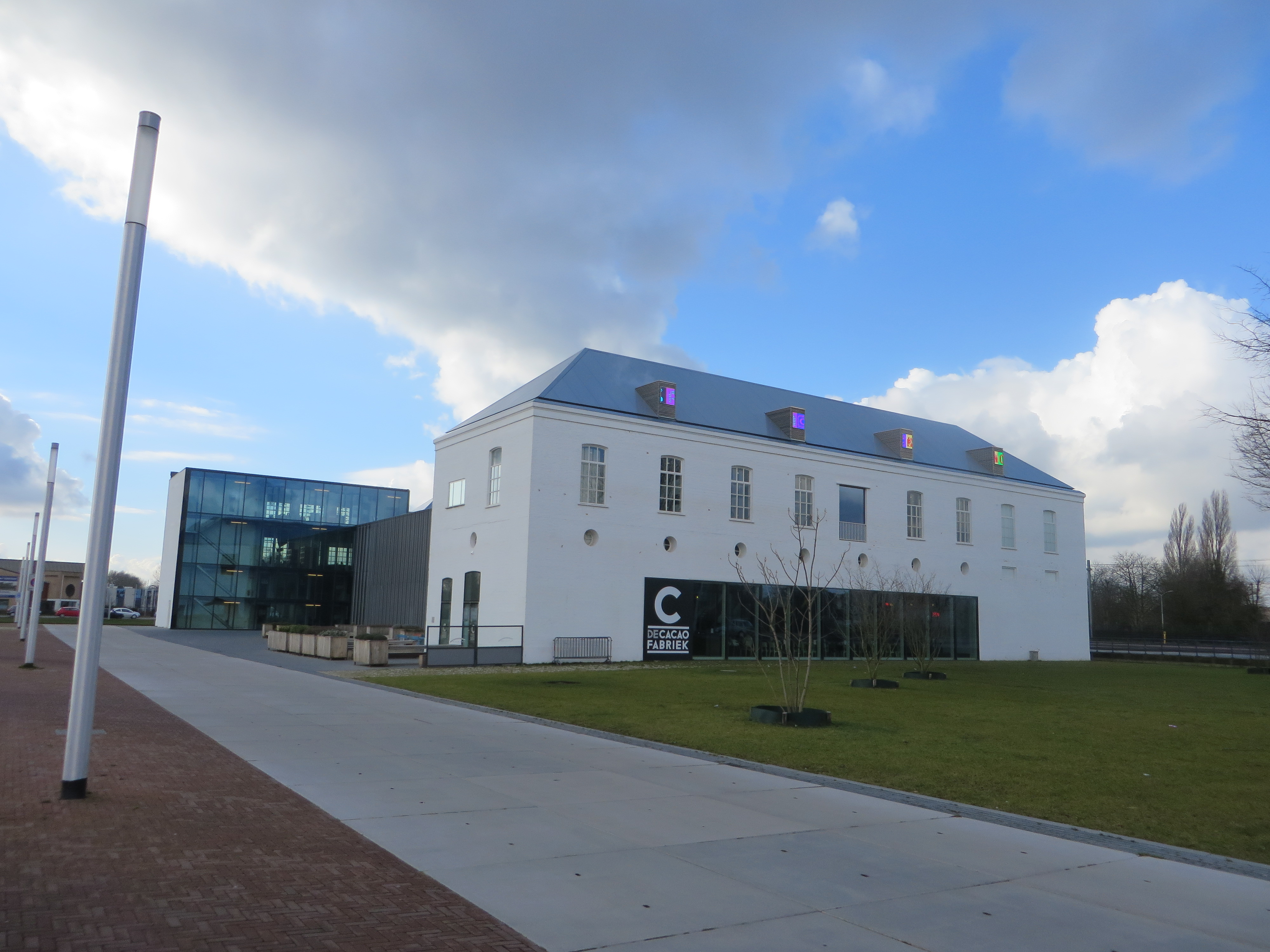 Kanaaldijk Z.O. 100-120, Engelseweg 1-13a